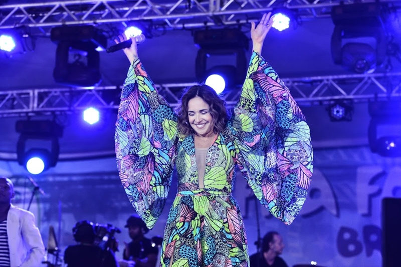 A cantora brasileira Daniela Mercury se apresenta no Fifa Fan Fest em Taguatinga, DF